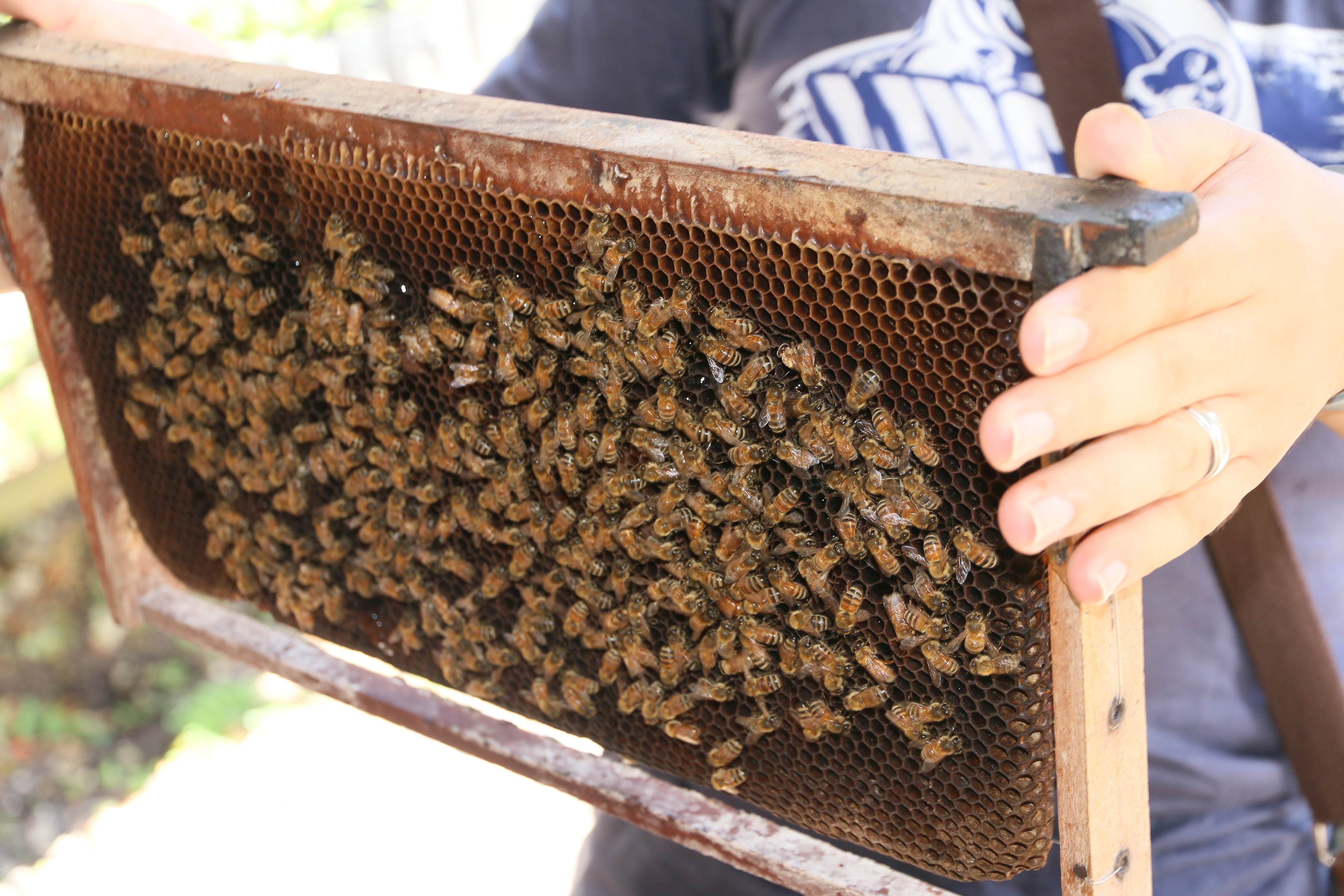 Honey comb frame.